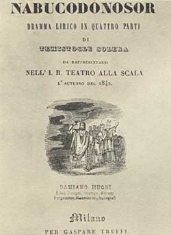 Nabucco. Okładka z 1852r.